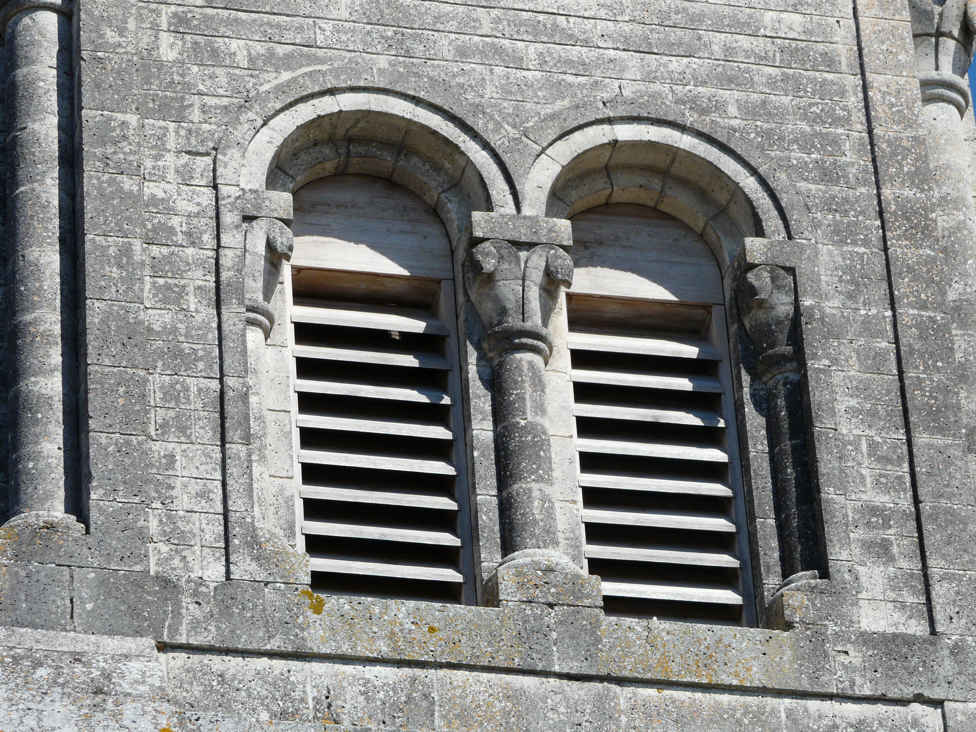 Les abat-son du clocher de l'église Notre-Dame de l'Assomption, Échourgnac, Dordogne, France.